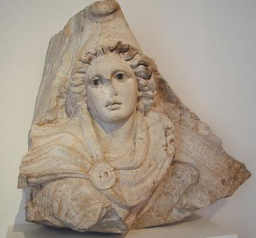 Kultrelief des Mithras, Fundort Rom, 2. Jahrhundert. Badisches Landesmuseum Karlsruhe.